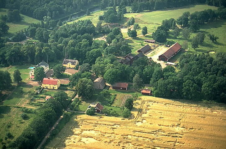 Solberga gård med Svartån i bakgrunden. Solberga narurreservat längst uppe till vänster i bild Motiv: Solberga Nyckelord: Flygbilder, Naturreservat, Riksintressen Kategori: Herrgårds-/slottslandskap Solberga gård med Svartån i bakgrunden. Solberga narurreservat längst uppe till vänster i bild.